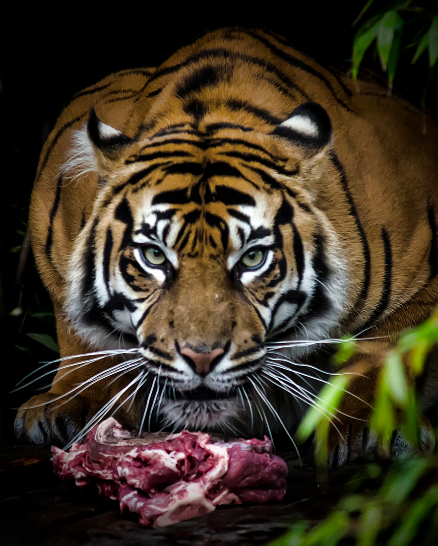 Sumatran Tiger Feeding